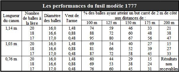 Performances du fusil modele 1777